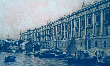 Messina: il vecchio Palazzo Municipale, costruito nel 1820 da Giacomo Minutolì: prospetto su Via Vittorio Emanuele. Fu distrutto da un incendio nel corso del terremoto del 1908.